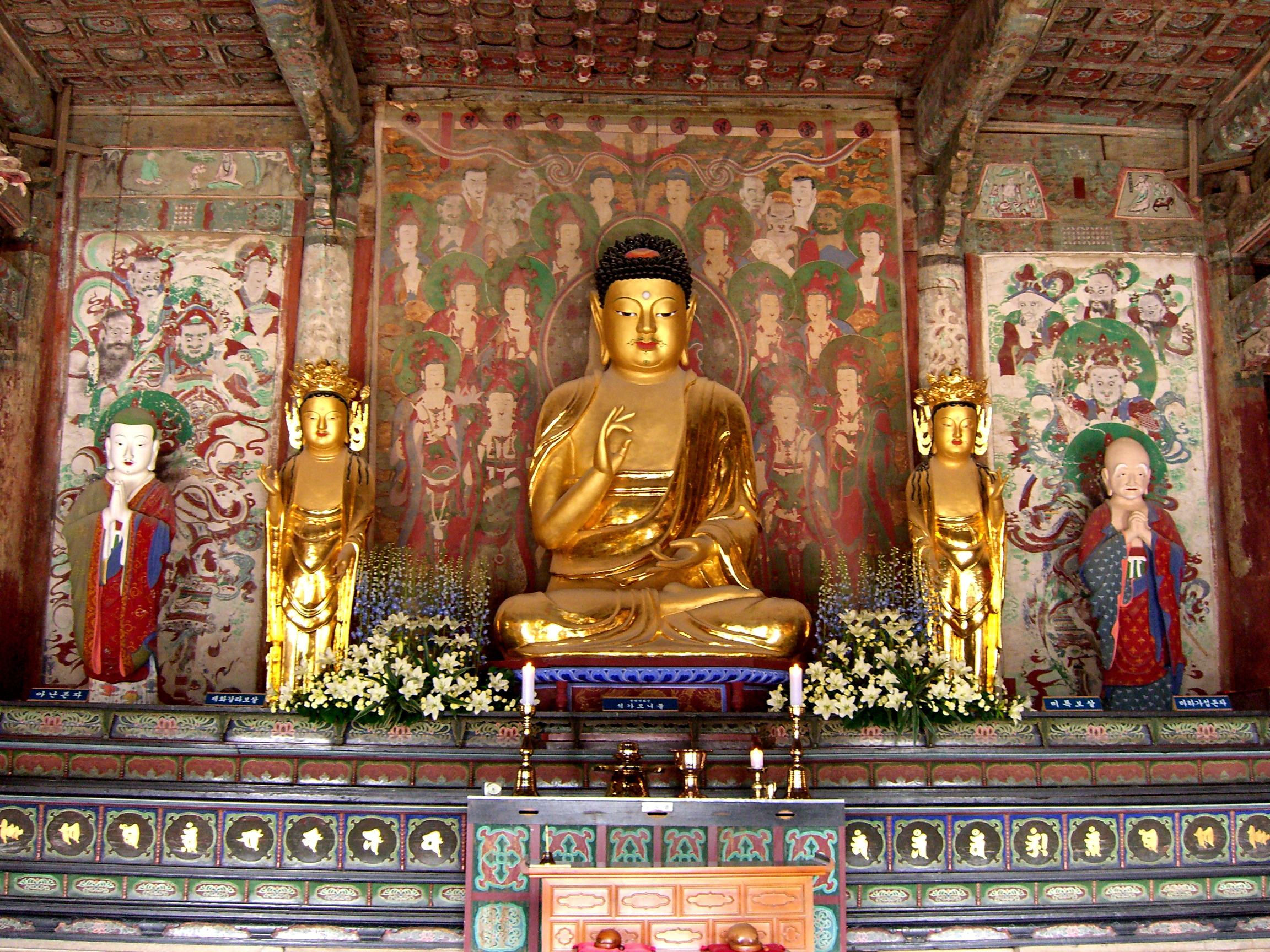 Buddha at Bulguksa Temple.